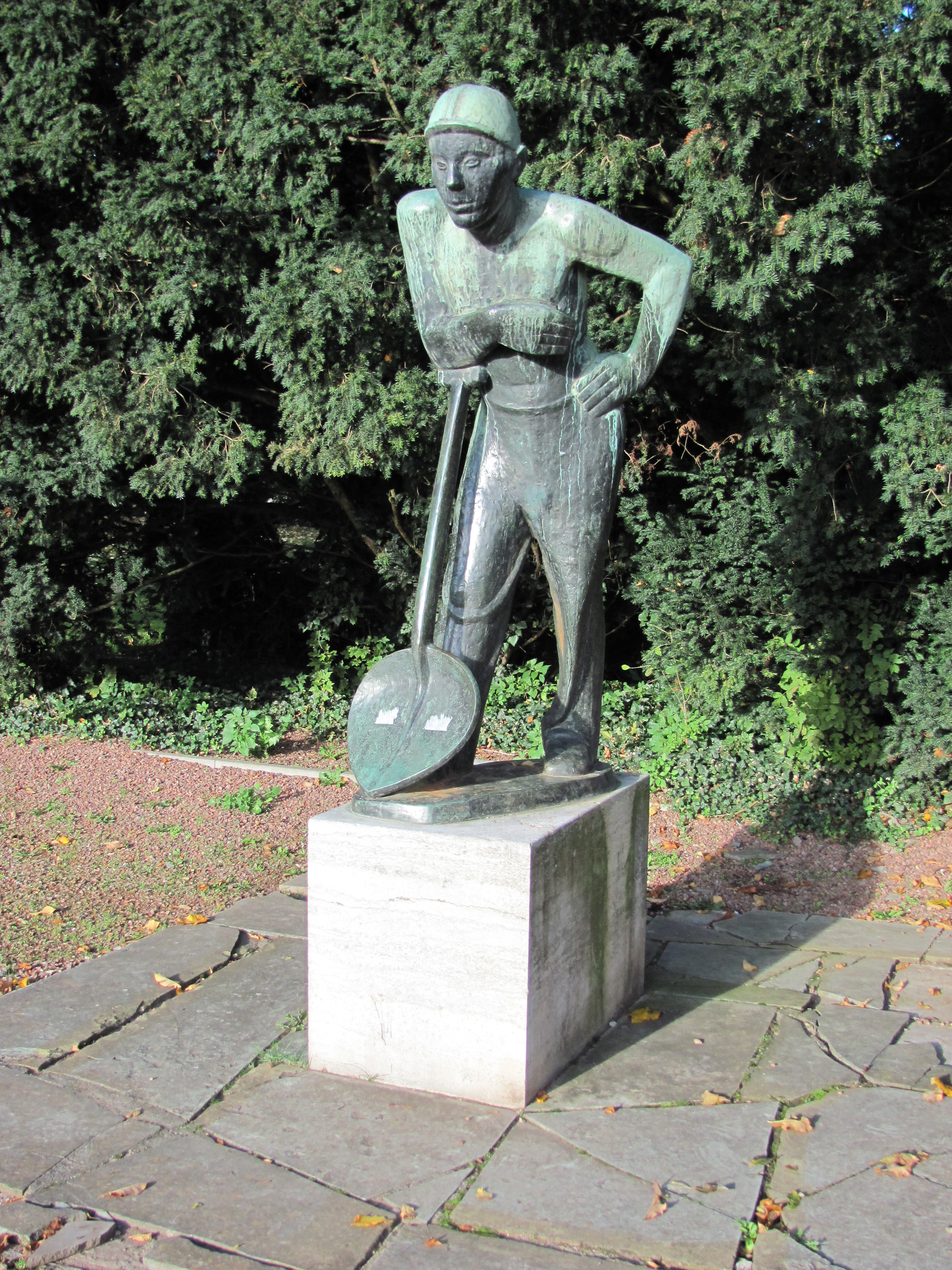 „Bergmann“ im Sidney-Hinds-Park (vor dem Bahnhof)